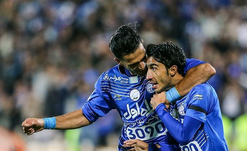 علی قربانی و سید محسن کریمی در دیدار تیم‌های فوتبال استقلال و مس کرمان - جام حذفی